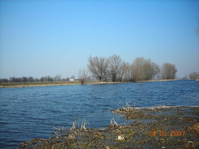 Dziecinów